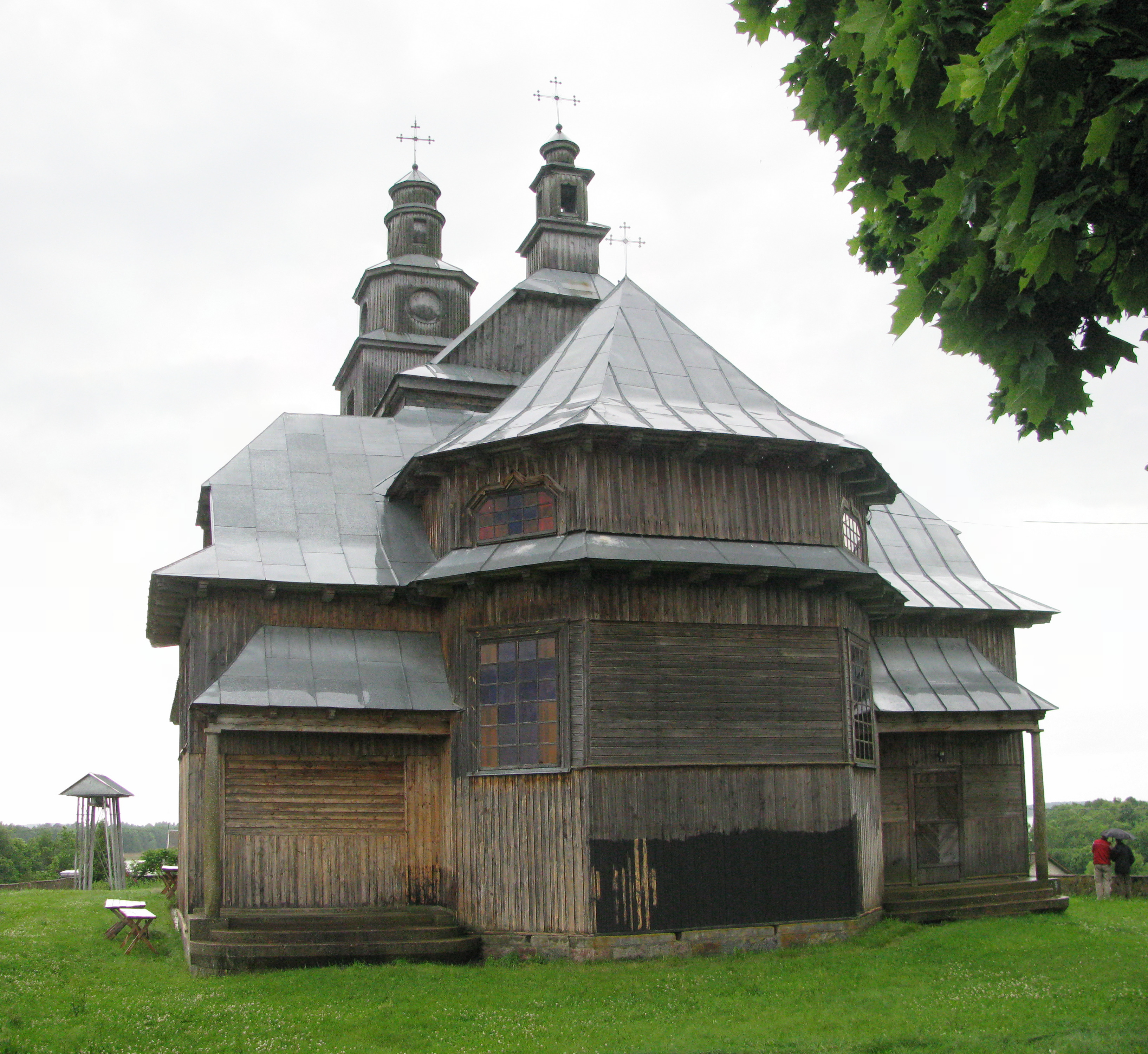 Беларуская (тарашкевіца): Петрапаўлаўскі касьцёл. в. Дрысьвяты This is a photo of Belarusian heritage monument. Reference number: 213Г000188 ( WLM)